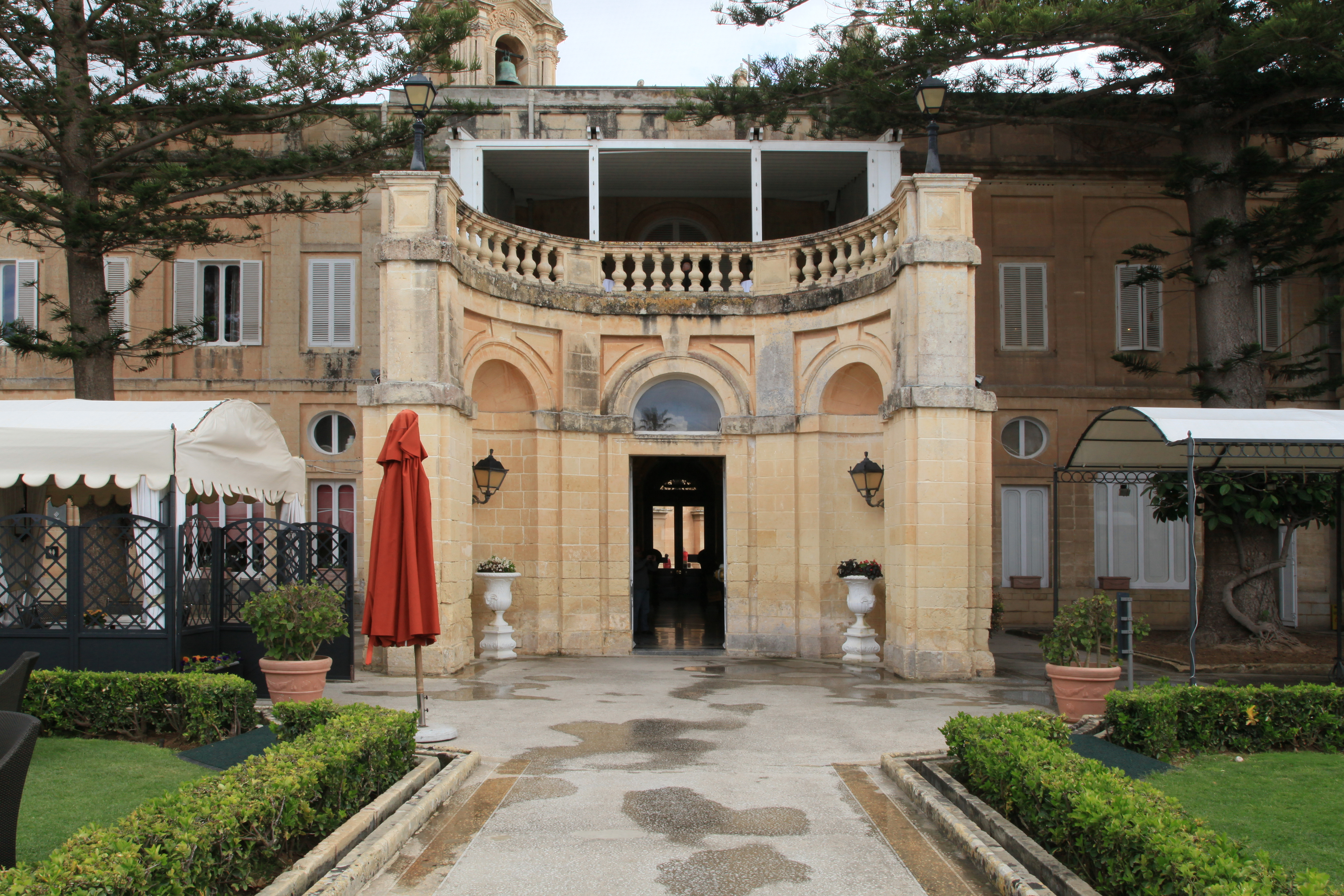 Palazzo Parisio at the Gardens, Triq il-Markiż Scicluna in Naxxar, Malta